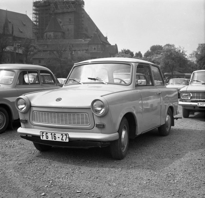 ADN-ZB/Ludwig, 19.6.1975 Autotypen: "Trabant 601" Er ist der Nachfolger des "Trabant 500". Die Karosseriebekleidung ist aus Duroplast. Hersteller: VEB Sachsenring-Automobilwerke Zwickau. 600 ccm, 26 DIN-PS, der Wagen hat sich im Inland und im soz. Ausland einen würdigen Platz im PKW-Angebot erobert.